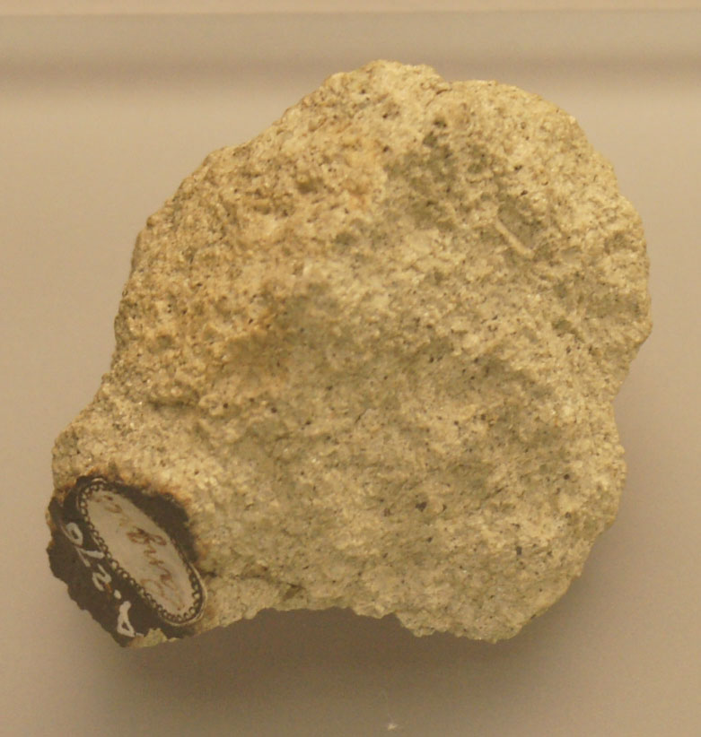 Fragment de la météorite de Chassigny, conservé au Muséum d'histoire naturelle de Vienne.